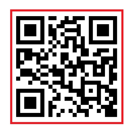 Bakul Sia